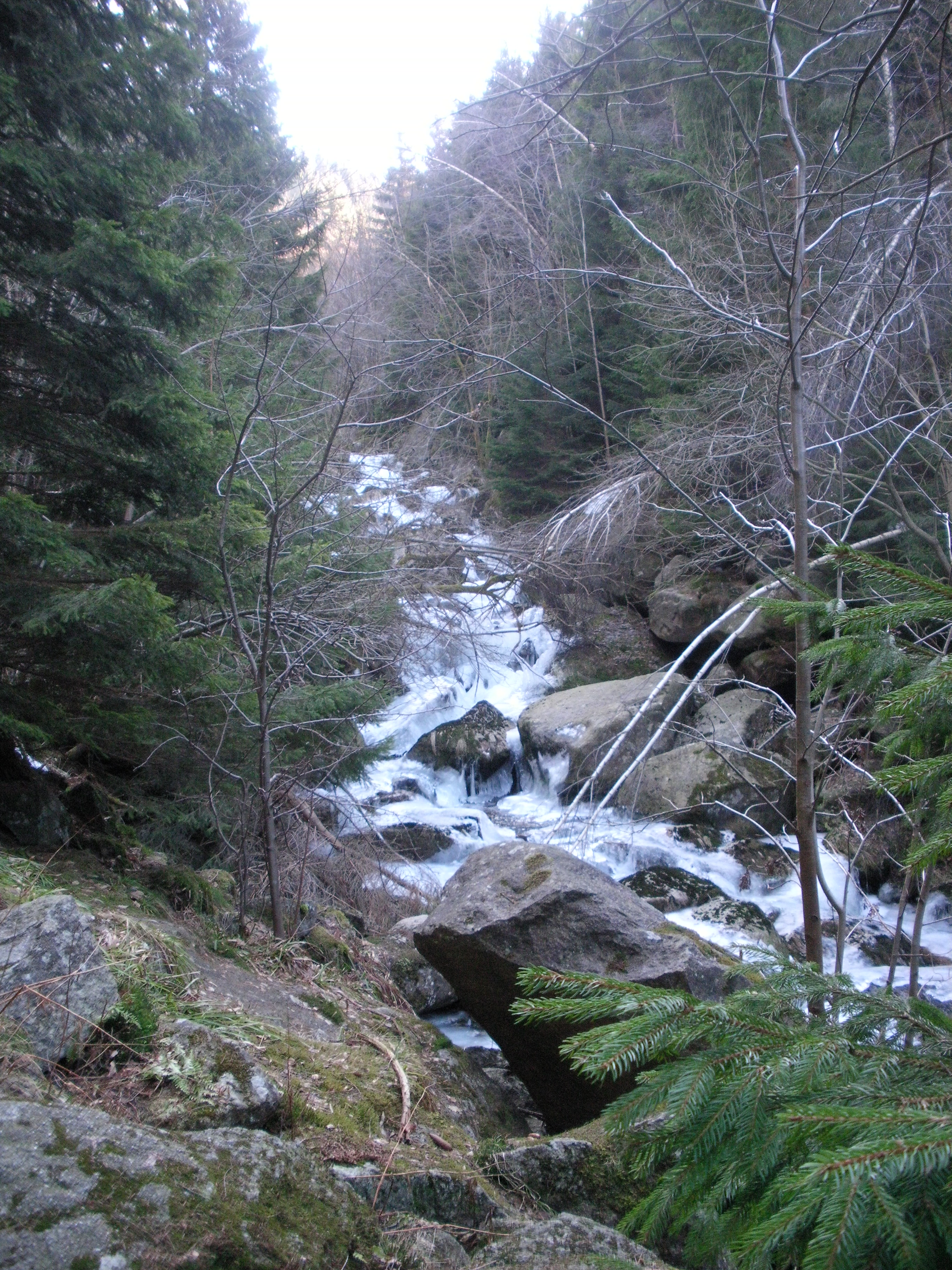 Steinerne Renne (vereist)